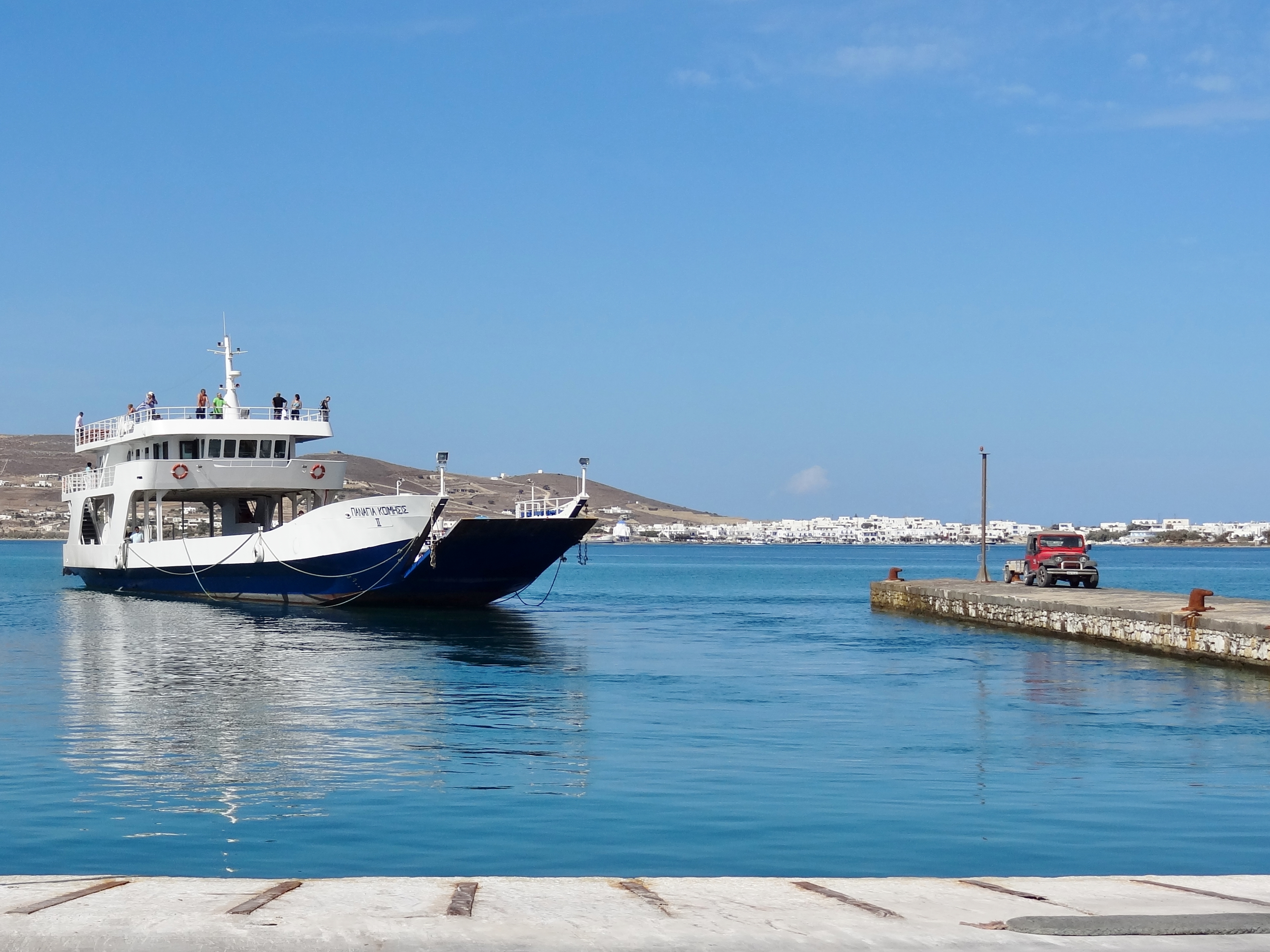 Anlegestelle von Pounta von Paros nach Antiparos, Kykladen, Griechenland